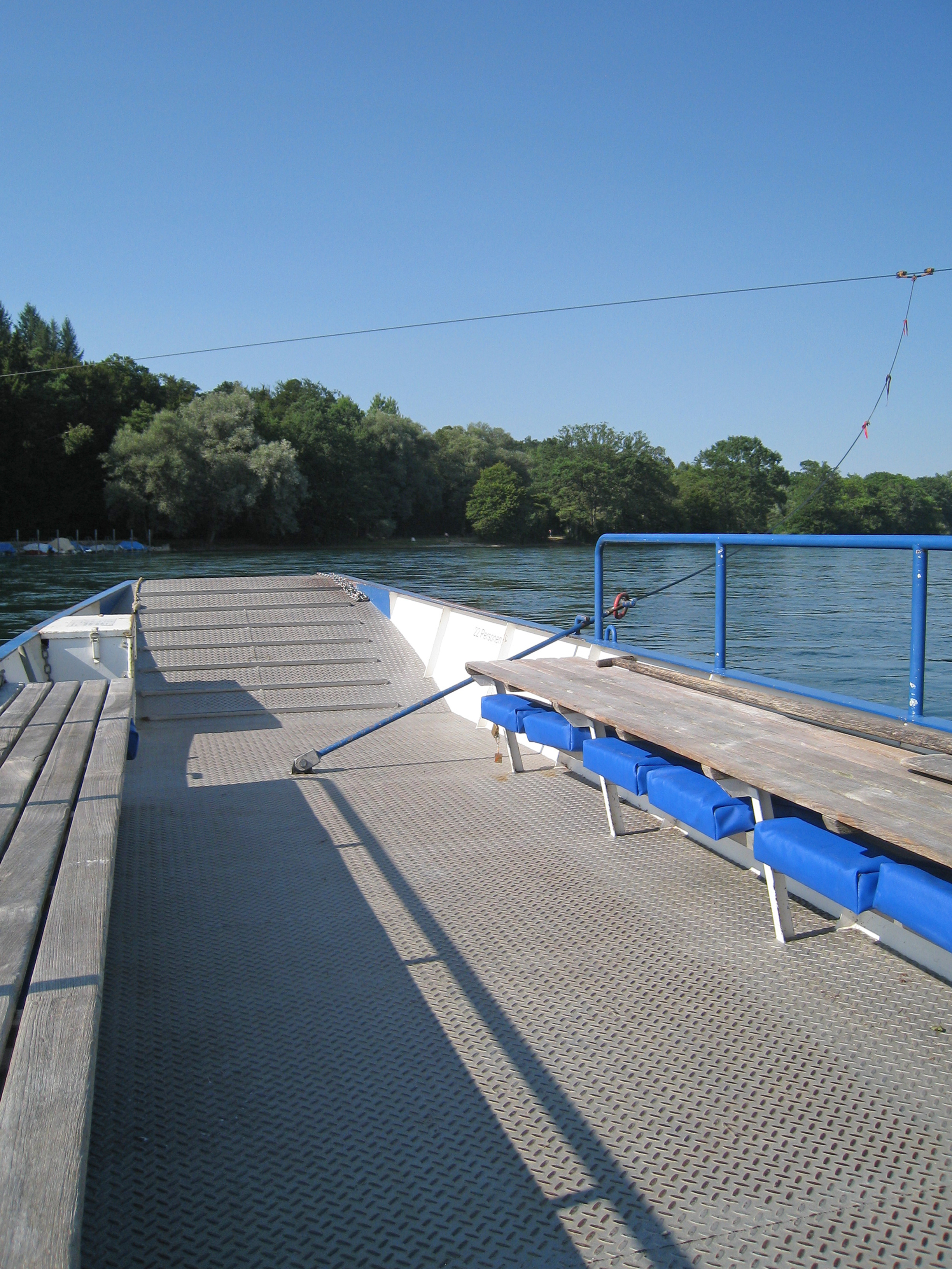 Fähre Ellikon am Rhein, Gemeinde Marthalen, Fahrtrichtung Deutschland